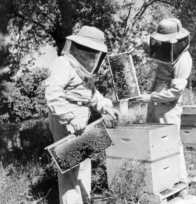 גן-שמואל - הכוורנים מוציאים את חלות הדבש מהכוורות להפקת הדבש.